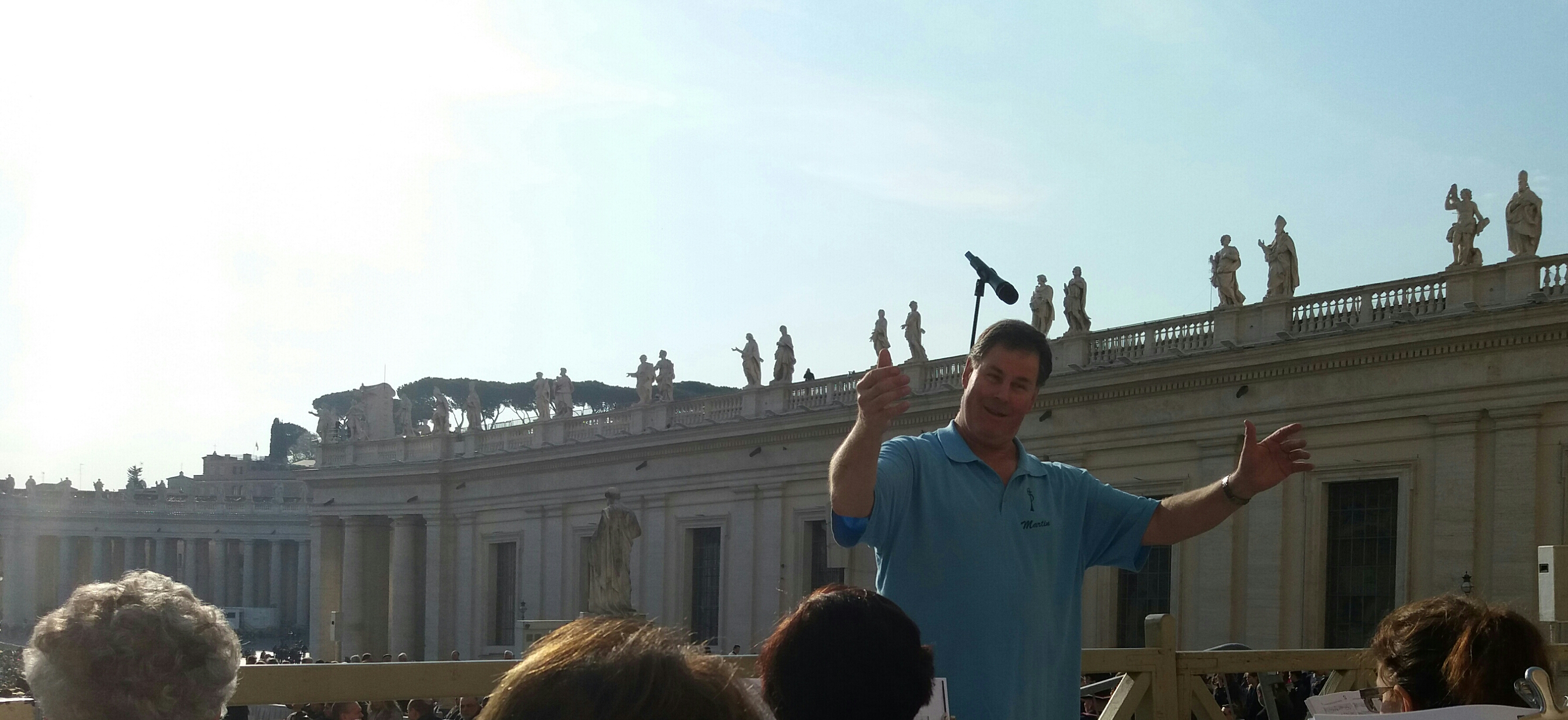 Landesposaunenwart Martin Huß auf dem Petersplatz in Rom